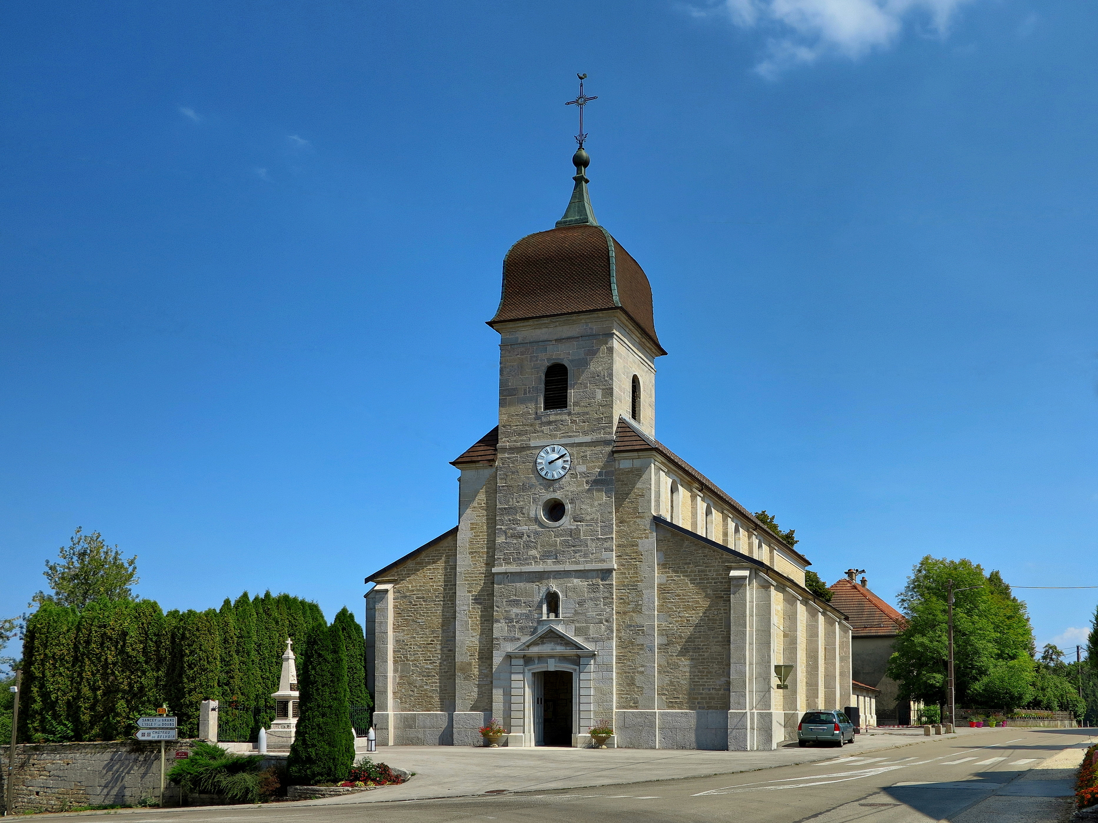 L'église